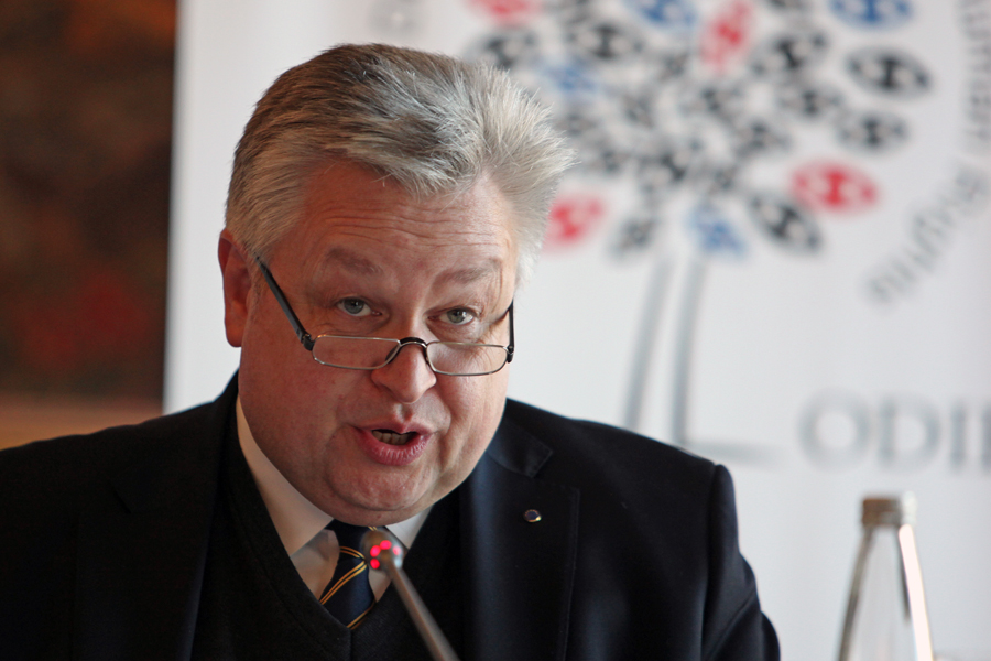 Der FDP-Politiker Michael Link am 19. März 2018 bei einer Pressekonferenz in Moskau. Als Leiter der OSZE-Wahlbeobachtermission bei den Präsidentschaftswahlen 2018 in Russland präsentierte er dort die Schlussfolgerungen des Einsatzes.